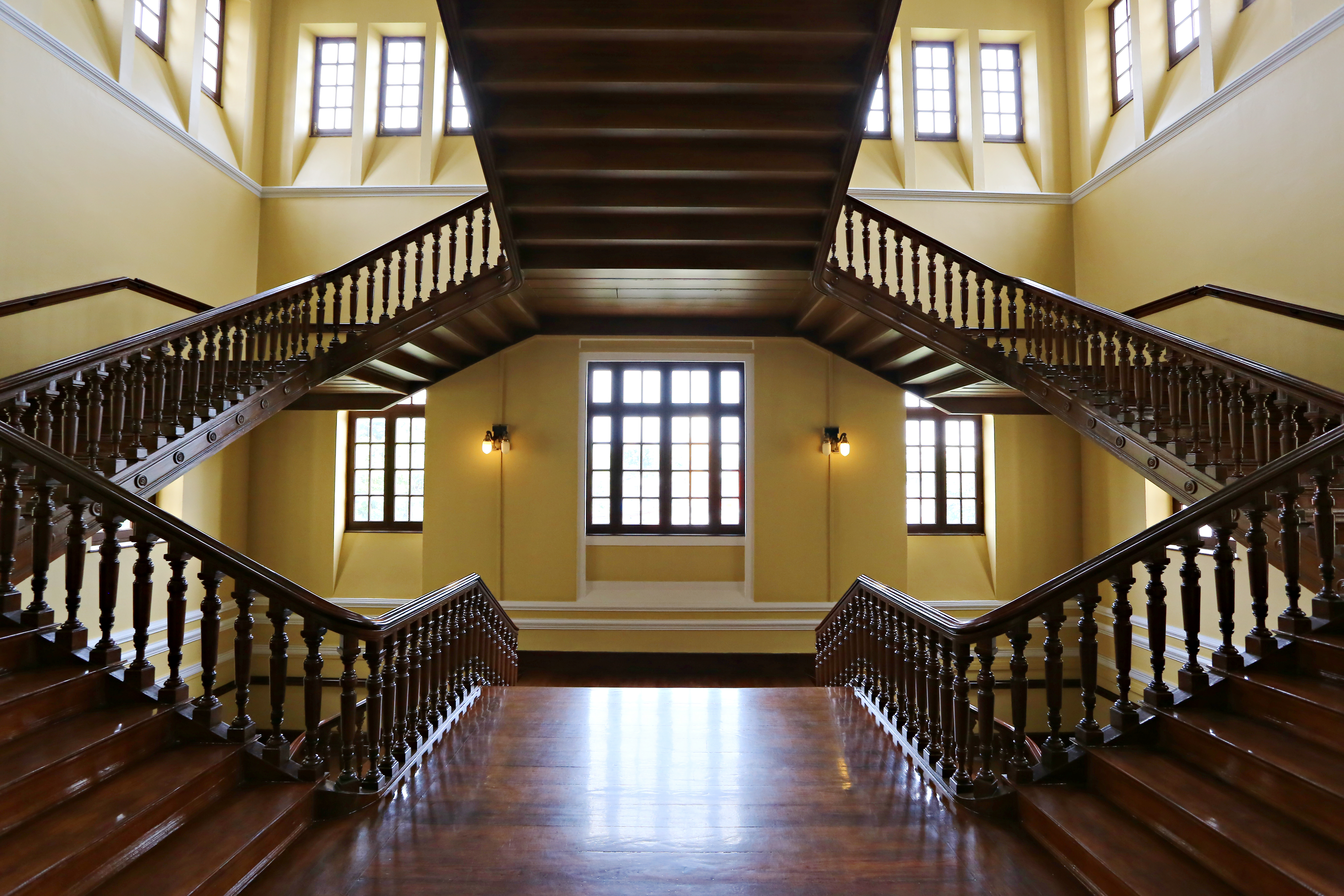 กระทรวงพาณิชย์